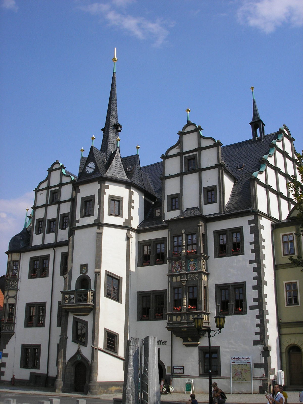 Das Rathaus von Saalfeld (Thüringen, Deutschland).